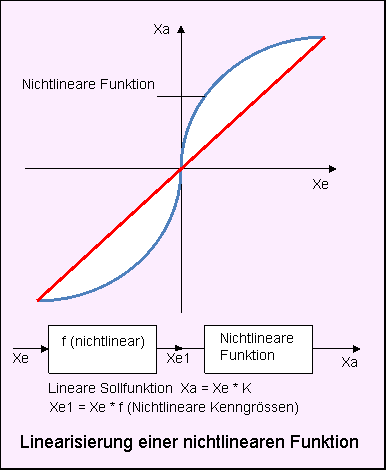 Linearisierung eines nichtlinearen Systems